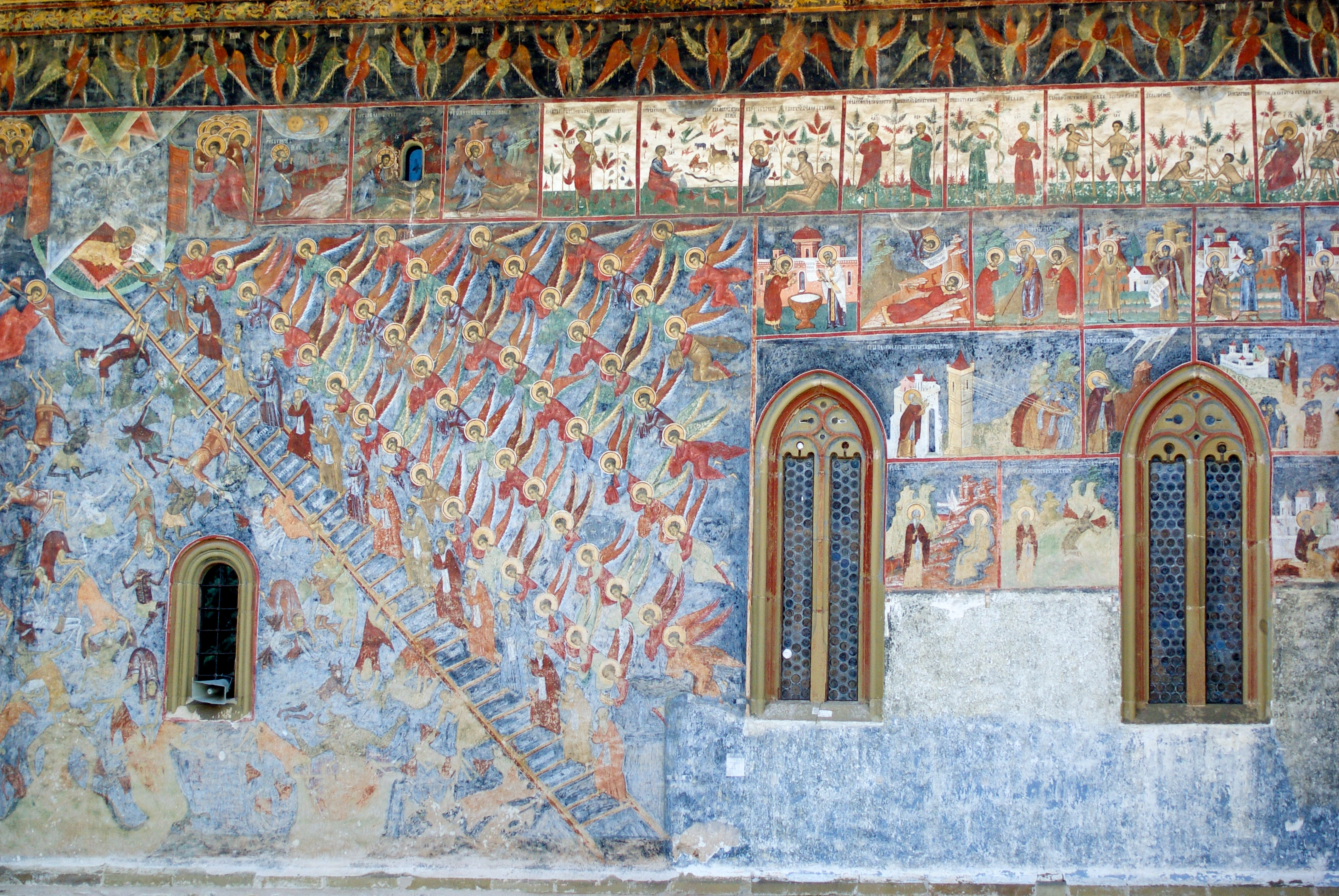 Fresko "Stufenleiter der Tugenden" an der Kirche im Kloster Sucevița